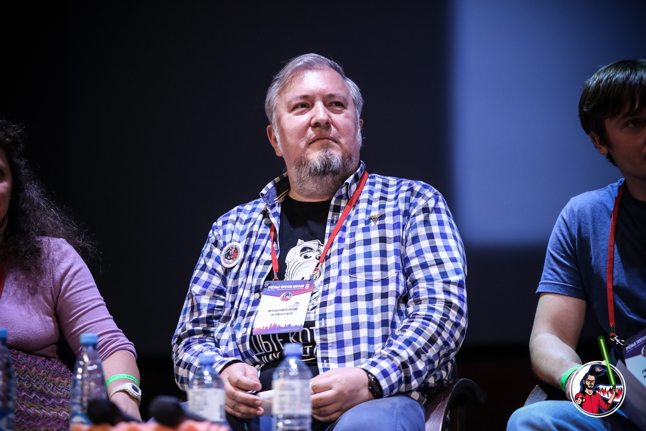 А. В. Водовозов на форуме «Учёные против мифов-8» 6 октября 2018, Москва, НИТУ «МИСиС»